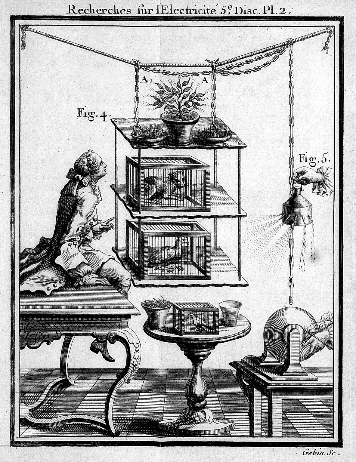 Electrical experiments Rare Books